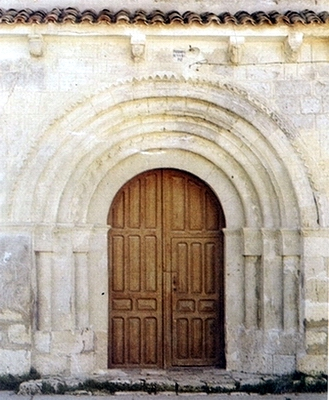 Portada romanica de la Iglesia de la Virgen de la Paz en Cevico Navero (Palencia, Castilla y León). Construida entre los siglos XII y XIII, con abundantes modificaciones y reformas. Consta de tres naves y cabecera de tres ábsides semicirculares, aunque hoy sólo quedan algunos restos. La portada se abre en el muro norte, consta de cuatro arquivoltas abocinadas de medio punto con molduras cóncavas y convexas y un guardapolvos de dientes de sierra. En el interior se conservan algunos capiteles románicos. Los artesonados son del siglo XIV.